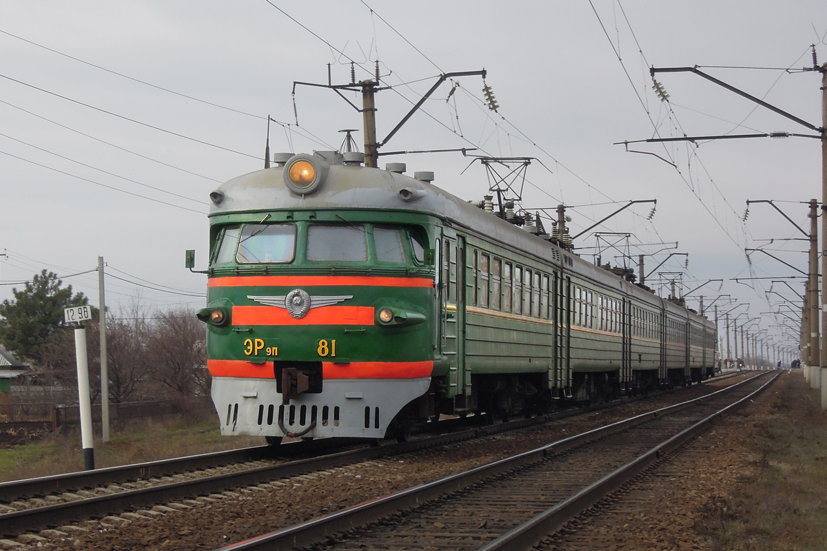 Электропоезд ЭР9П-81 сообщением Таганрог - Ростов, перегон Морская - Синявская С-КАВ ЖД.